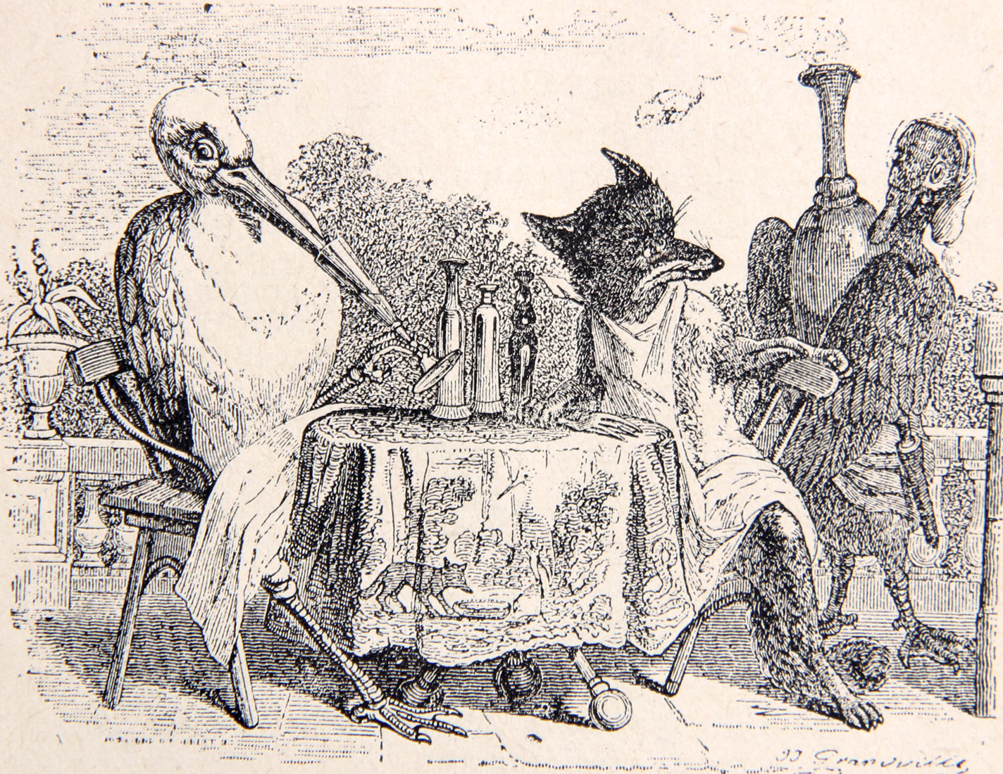 Illustration de Grandville pour Le Renard et la Cigogne de La Fontaine (I, 18)